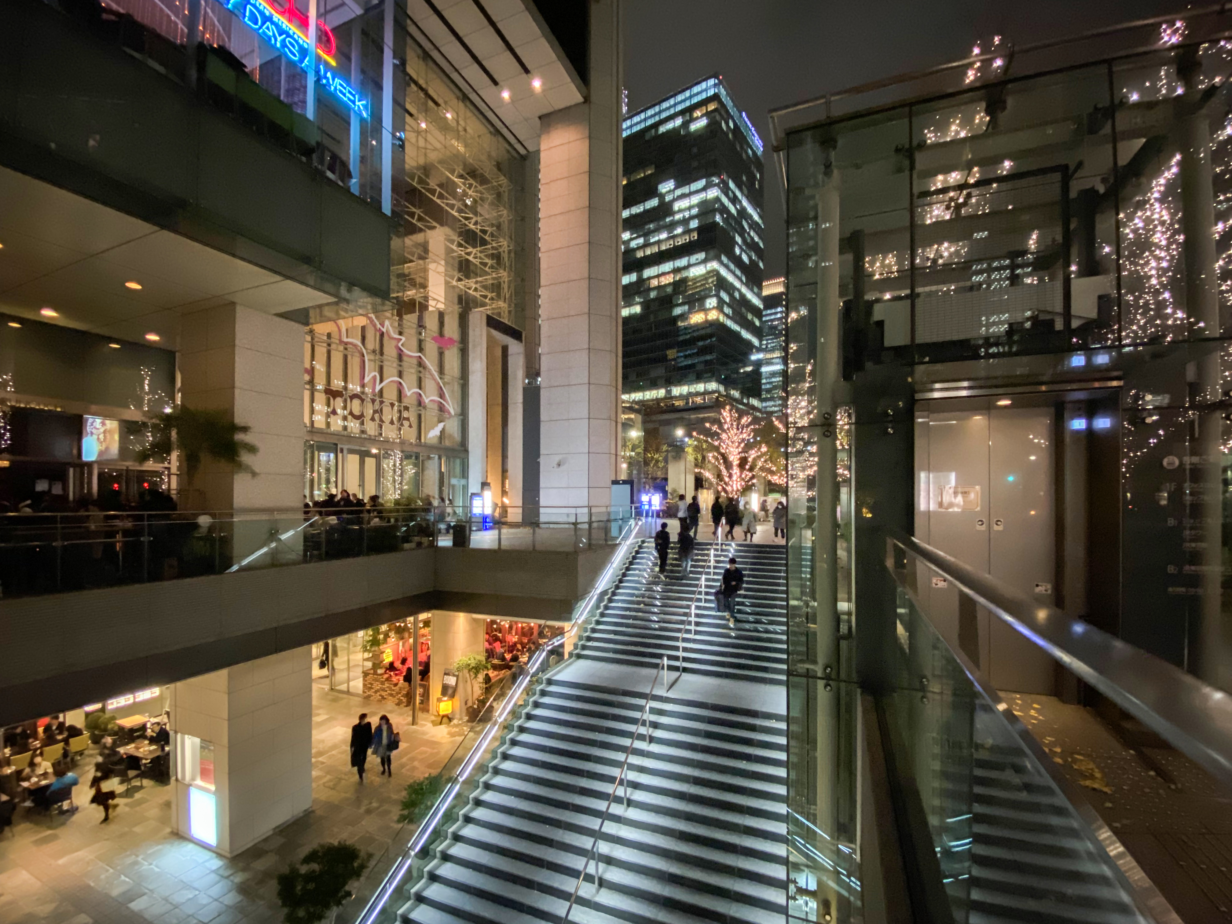 Tokyo Building Sunken Plaza